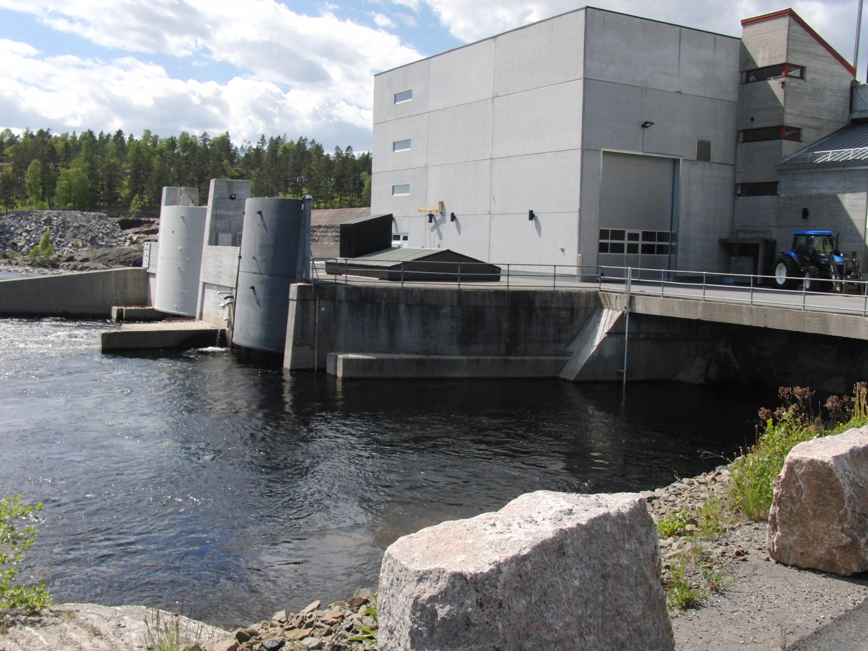 Flatenfoss kraftverk 2 og 3